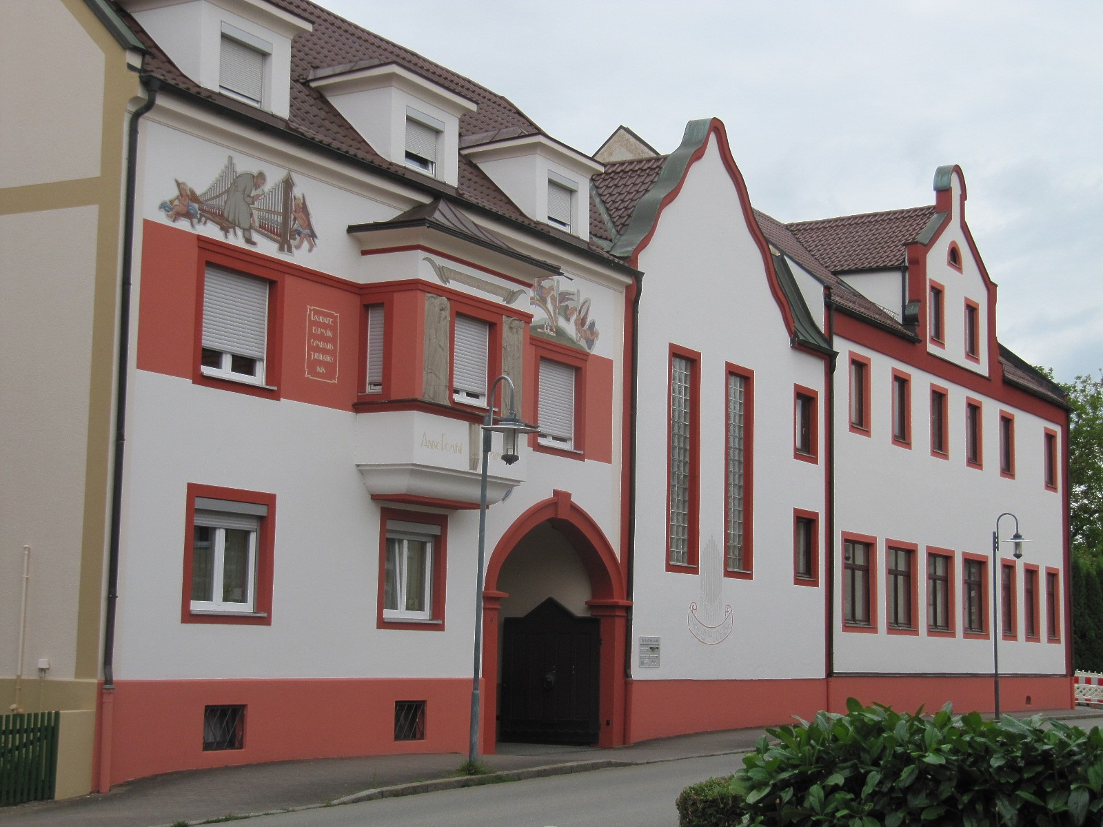 Firmengebäude der Orgelbau Firma Weise in 94447 Plattling, Dr.-Kiefl-Straße 6